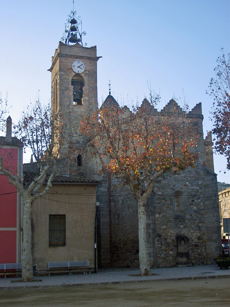 Església de Sant Feliu. Alella (Maresme)